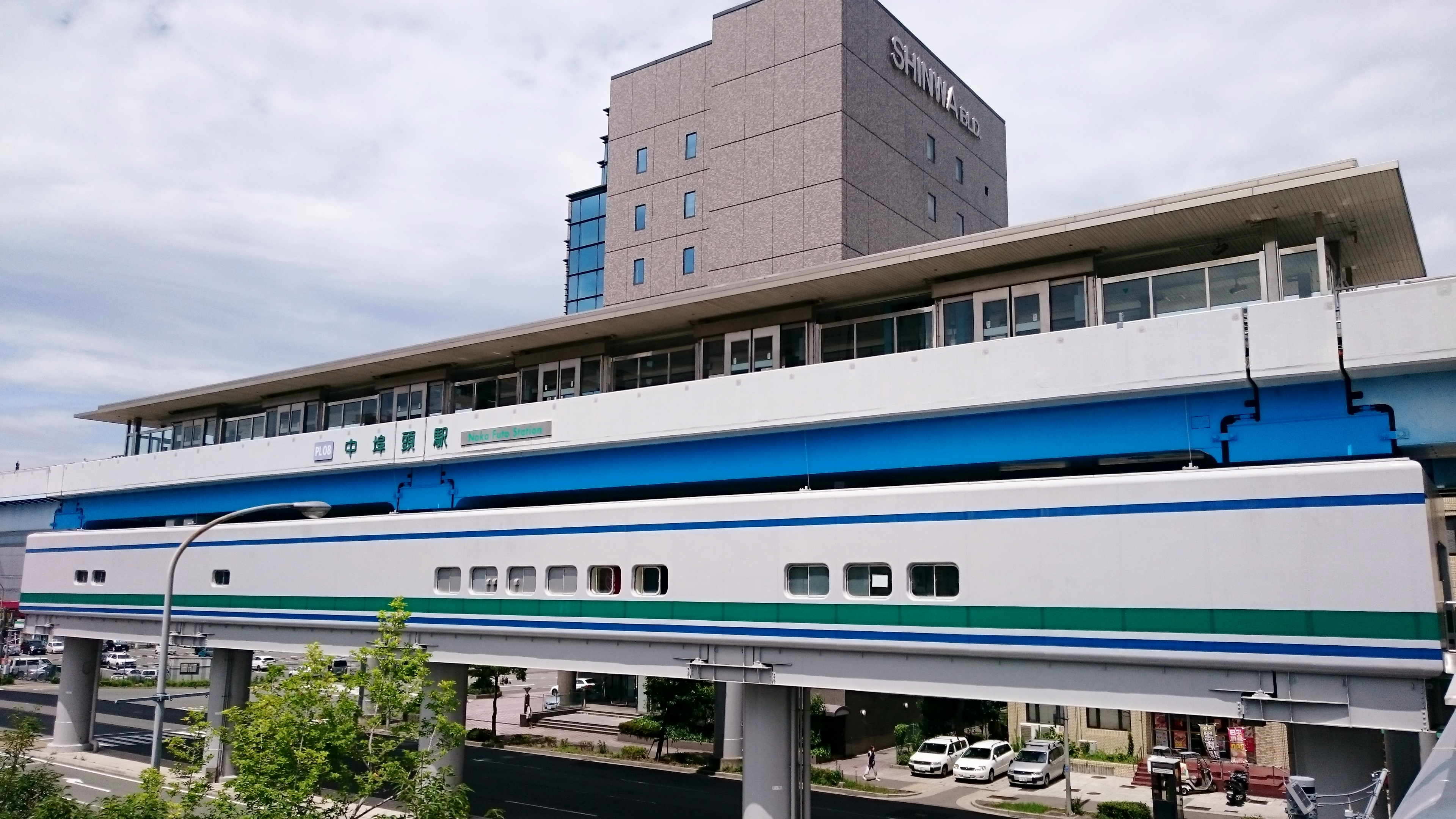 神戸新交通ポートアイランド線(ポートライナー) PL08 中埠頭駅 西側からの駅舎